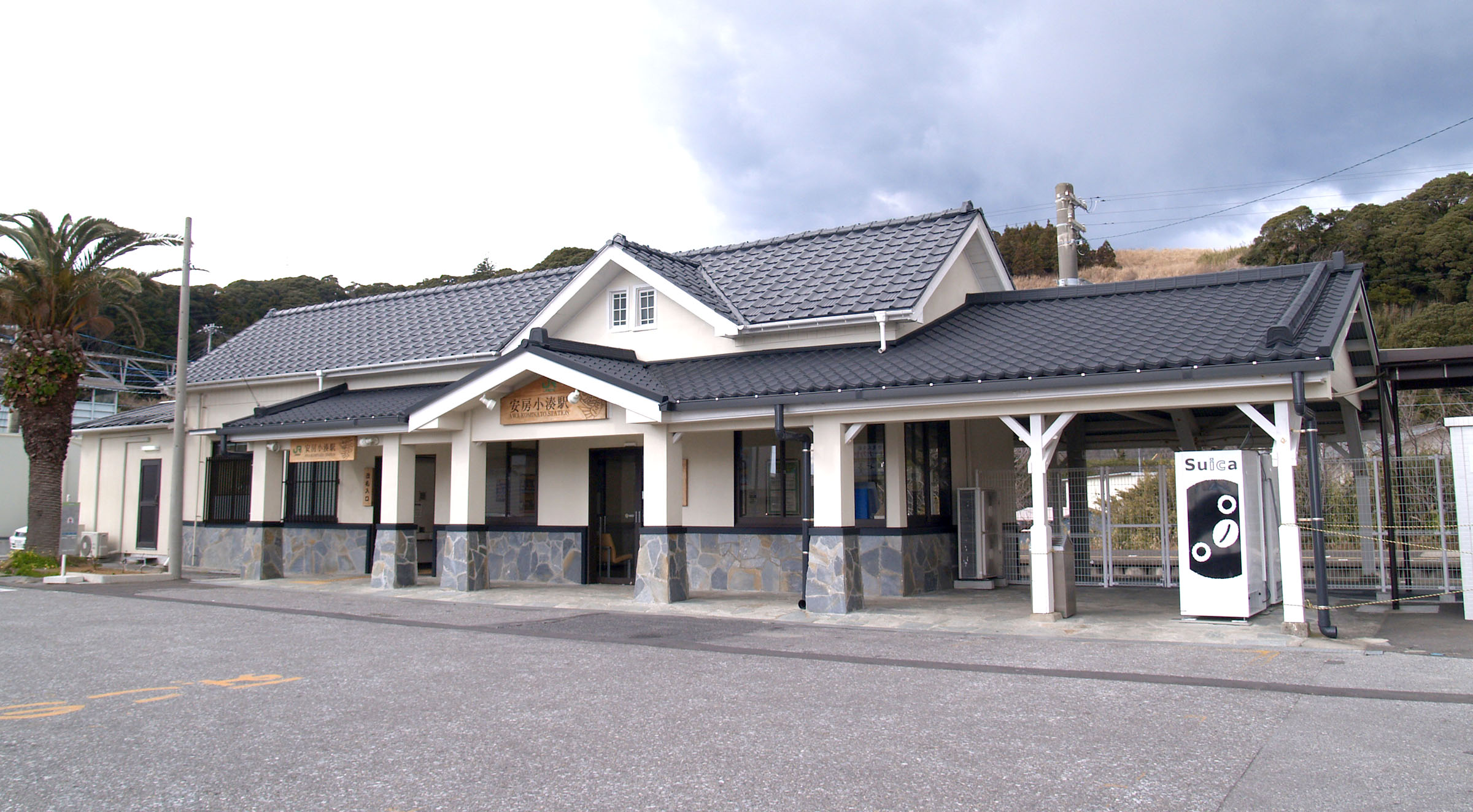 安房小湊駅